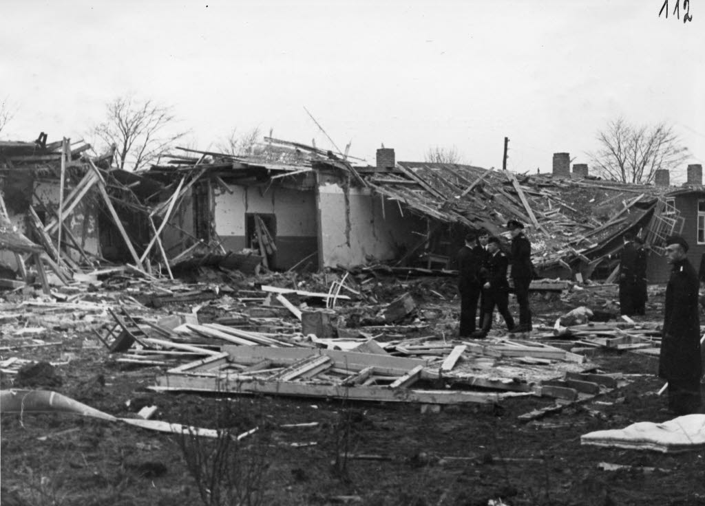 Stabsbaracke. 1 Sprengbombe 250 kg geschätzt.